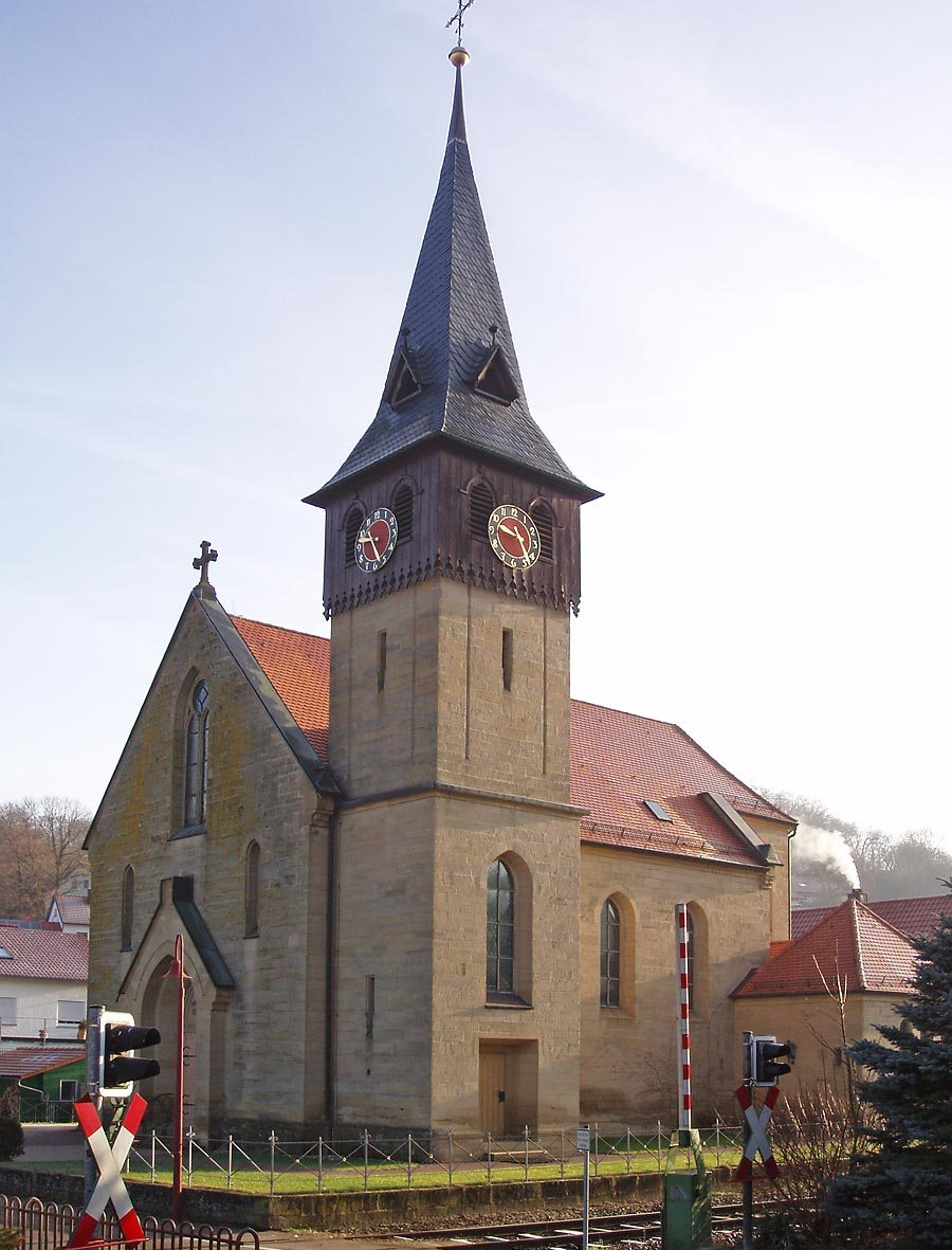 Katholische Kirche in Neckarbischofsheim-Untergimpern